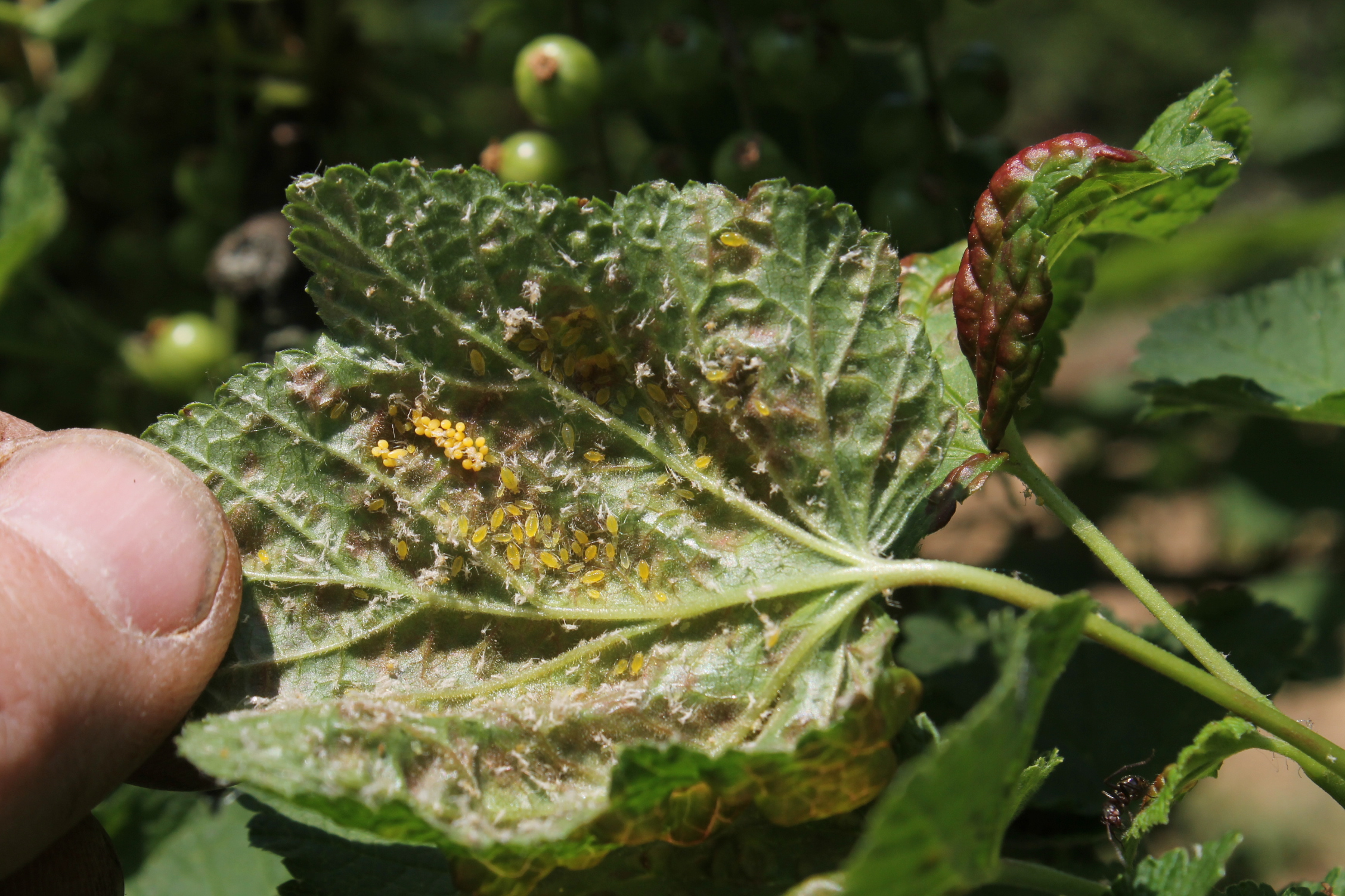 Mšice rybízová Cryptomyzus ribis na rybízu (patogen), Brno Komín